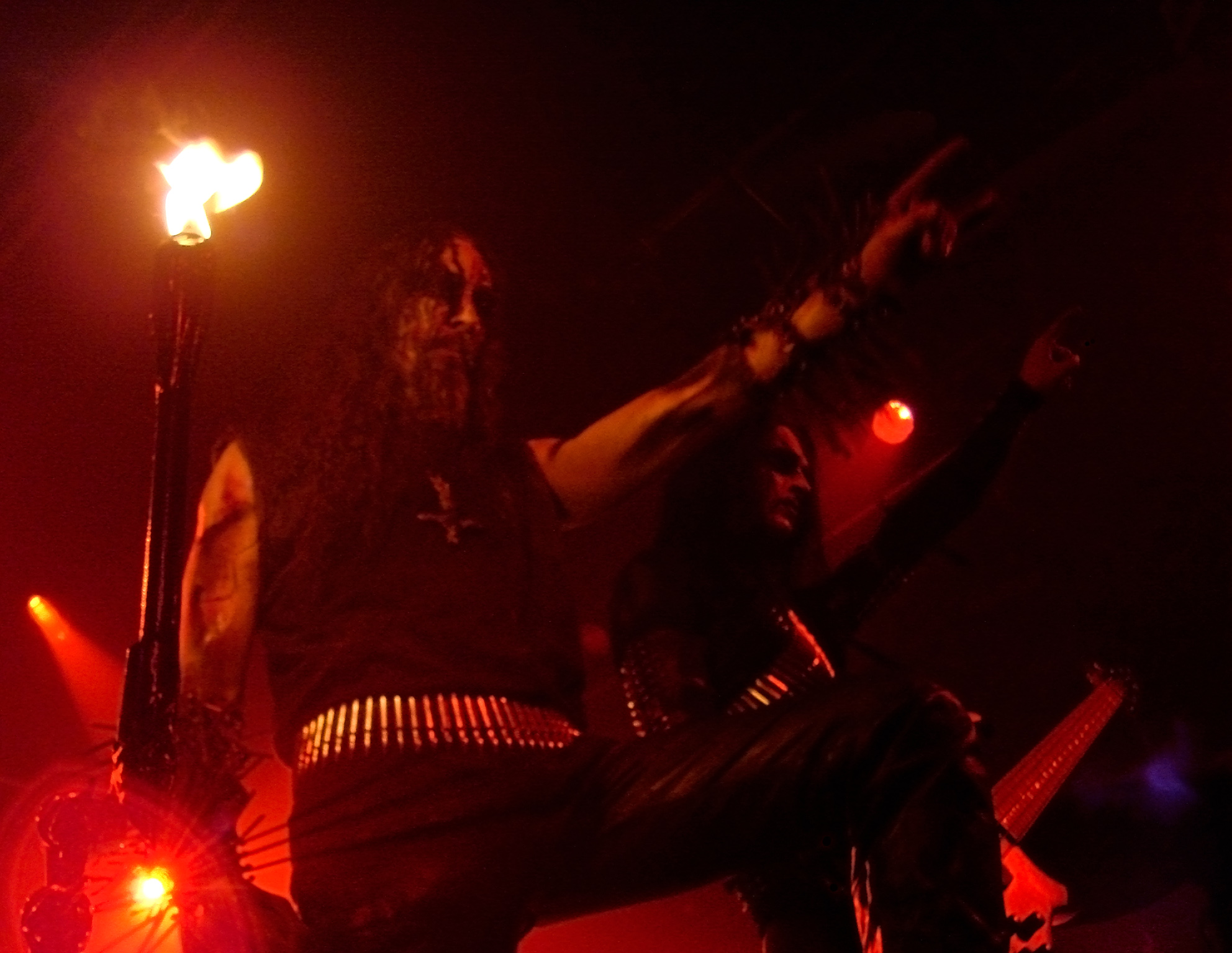 Gorgoroth, concert du 20/11/07 à la Locomotive à Paris.Gaahl et King.